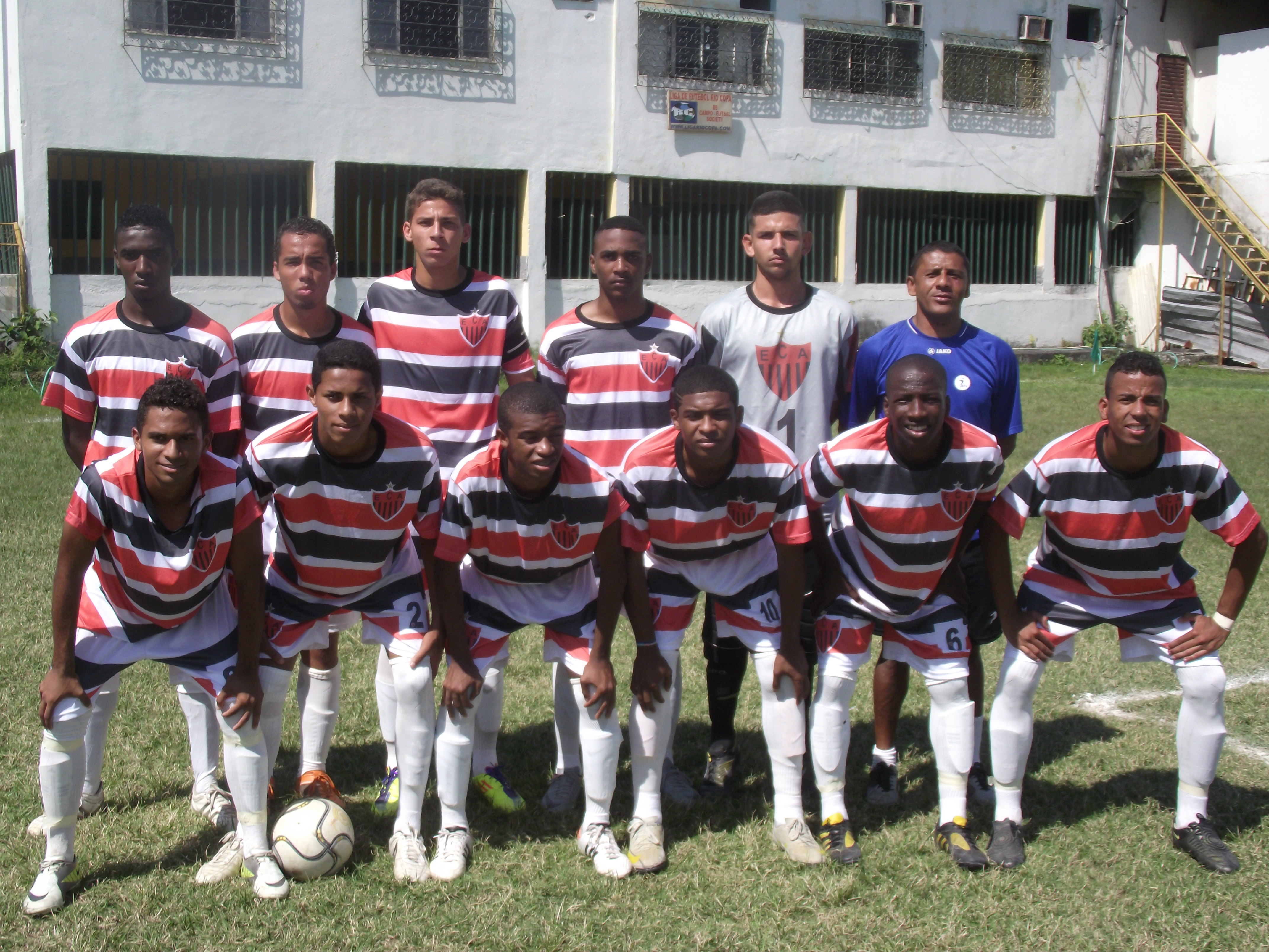 Equipe de Juniores do Anchieta em 2012.